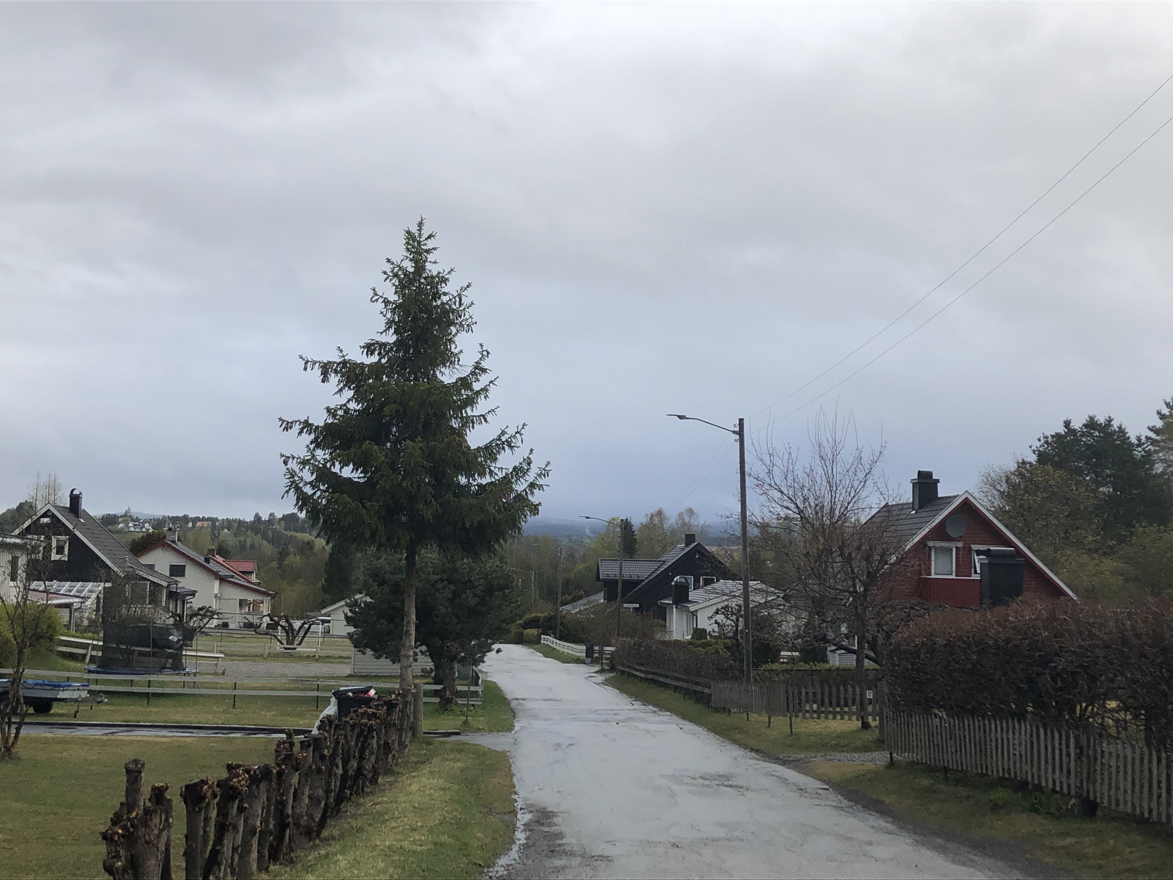 Livveien, Ringerike